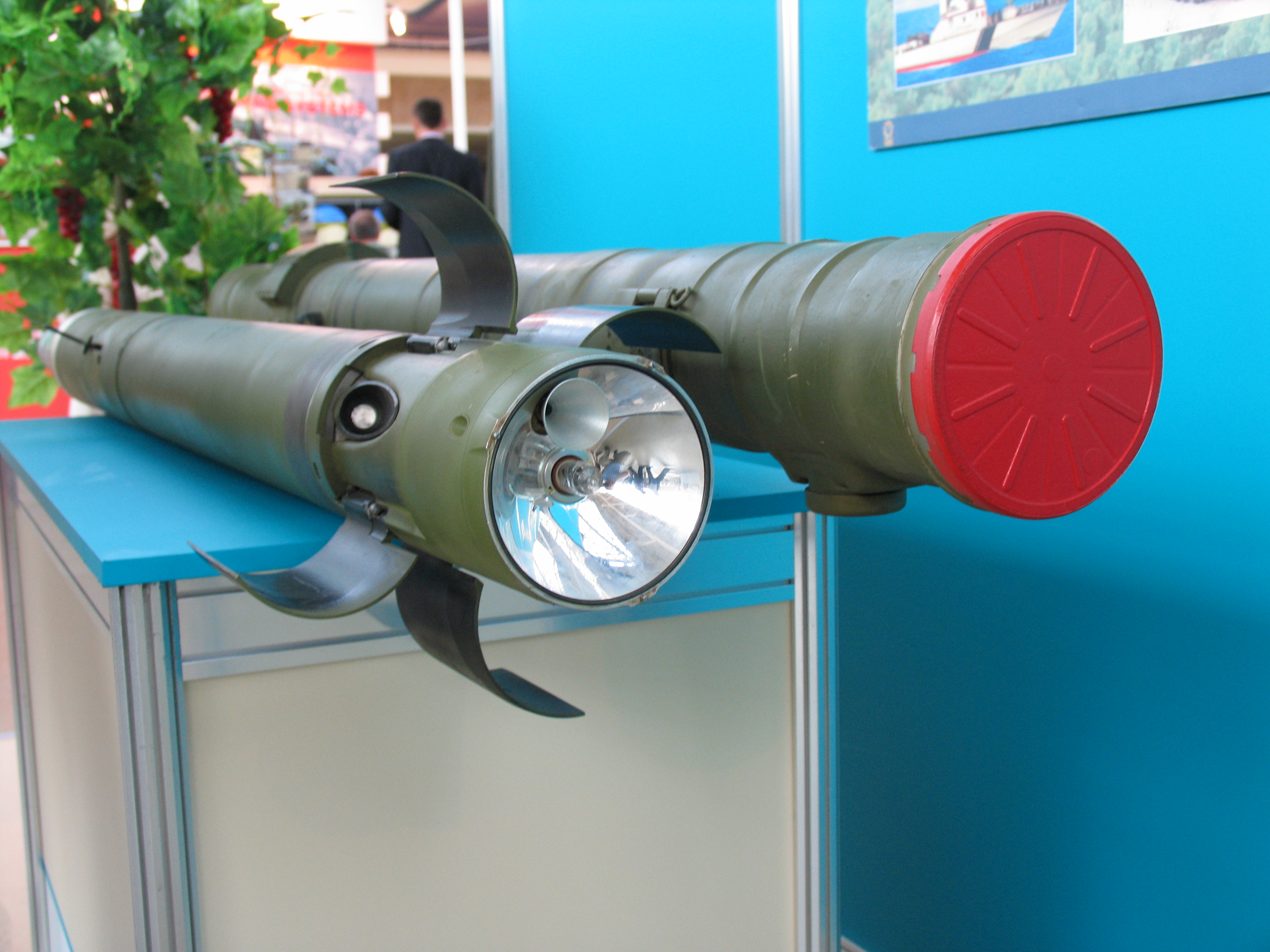 9K113 Штурм (задняя часть)